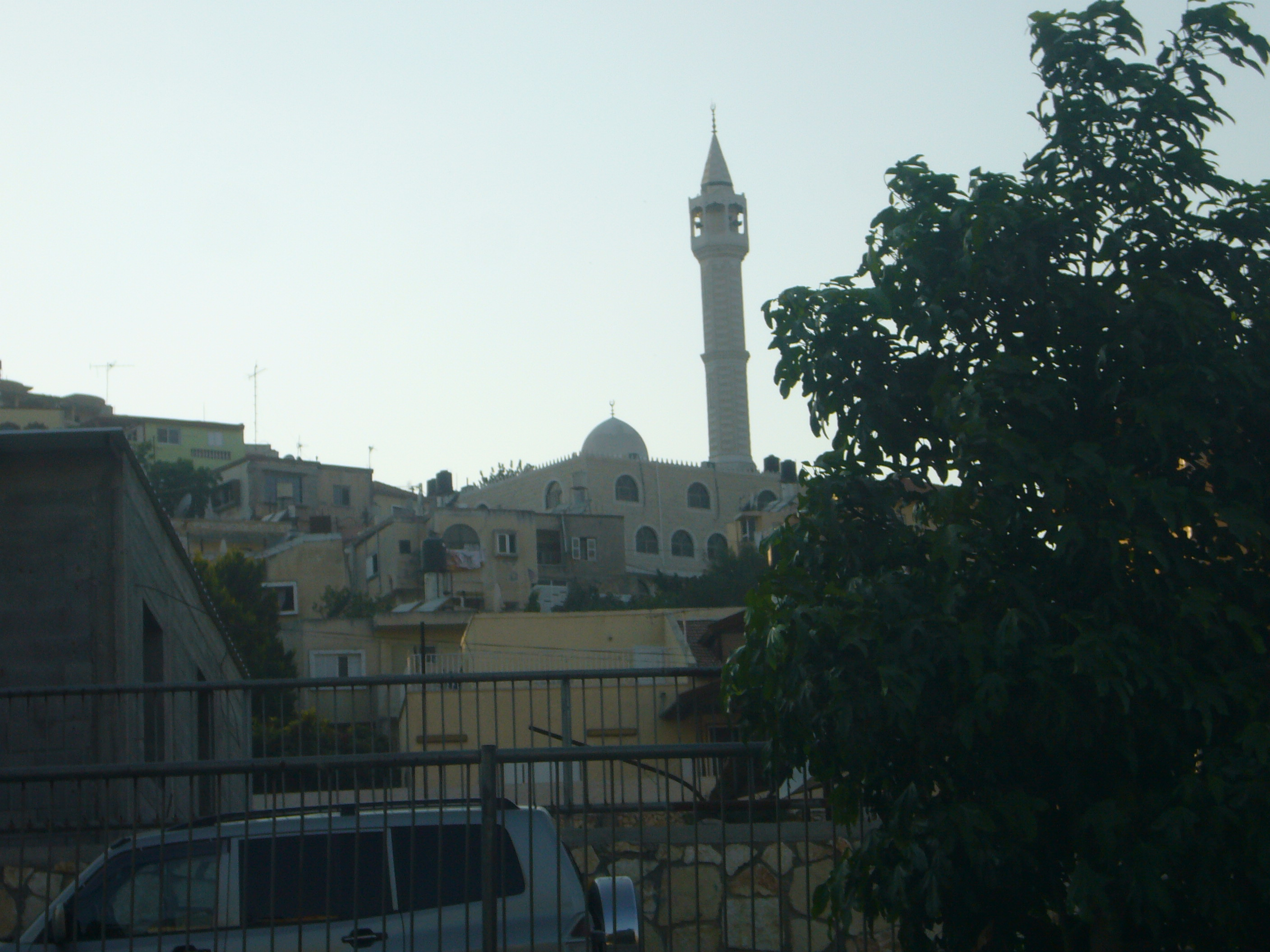 Mosque in Ar'ara